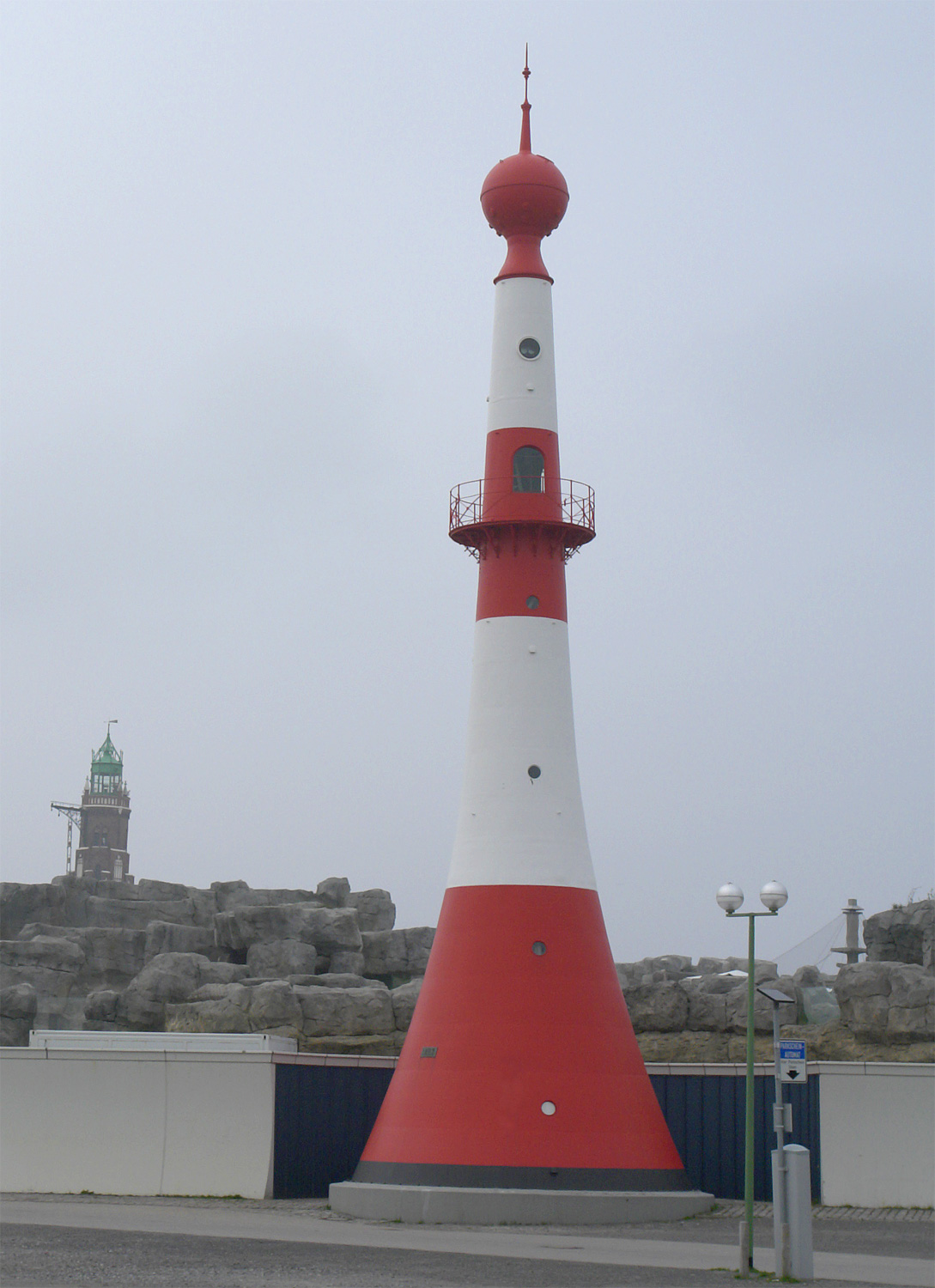 Bremerhaven. Unterfeuer Bremerhaven auf der Südmole der Schleuse. Links im Bild das zugehörige Oberfeuer, der Leuchtturm Bremerhaven Das Unterfeuer ist ein geschütztes Kulturdenkmal in der Freien Hansestadt Bremen, mit der Nr. 1542 beim Landesamt für Denkmalpflege registriert.